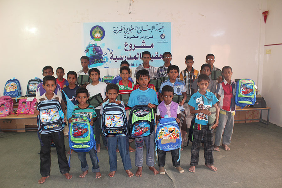 وادي حضرموت - توزيع الحقيبة المدرسية نفذته CSSW YEMEN